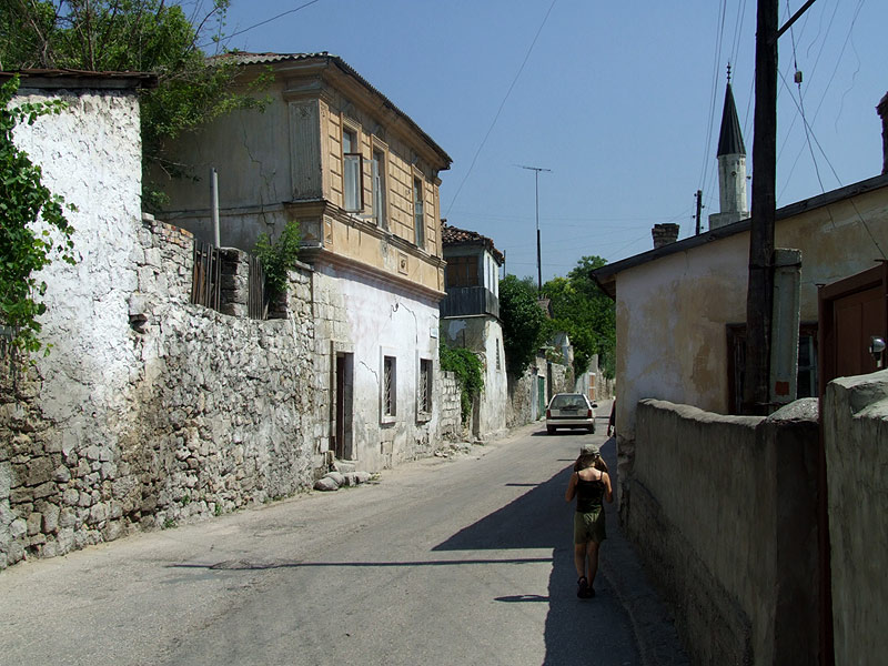 Uliczka w Bakczysaraju